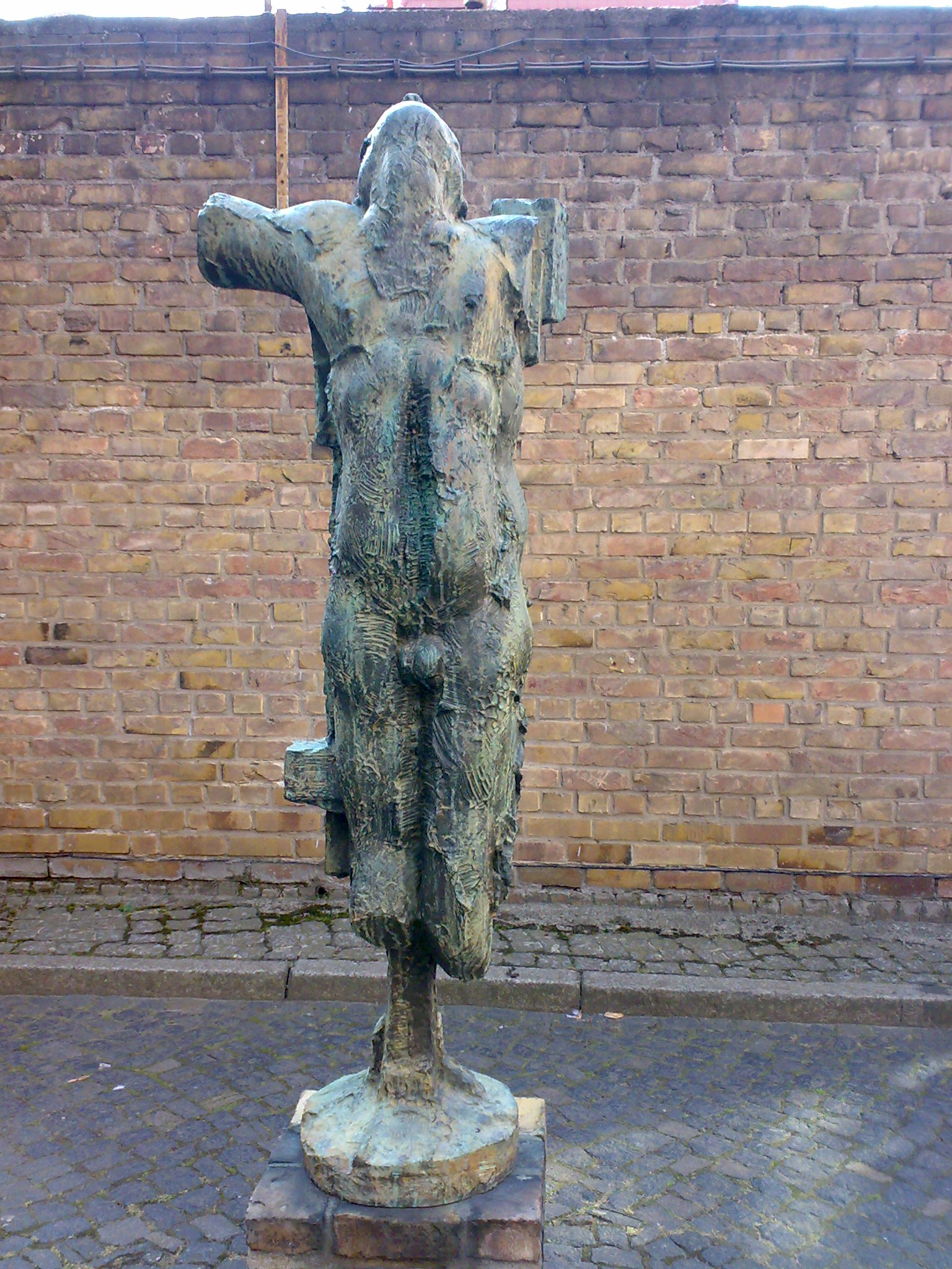 Denkmal „Das Opfer“ im Hof der heutigen Gedenkstätte Lindenstraße 54/55 in Potsdam (das sogenannte „Lindenhotel“). Die Skulptur ist von Wieland Förster geschaffen und den Opfern der Gewalt gewidmet.